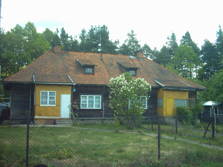 Osiedle robotnicze - Czworaki. Ostatni zachowany w prawie niezmienionej formie budynek z lat 30-tych XX w.